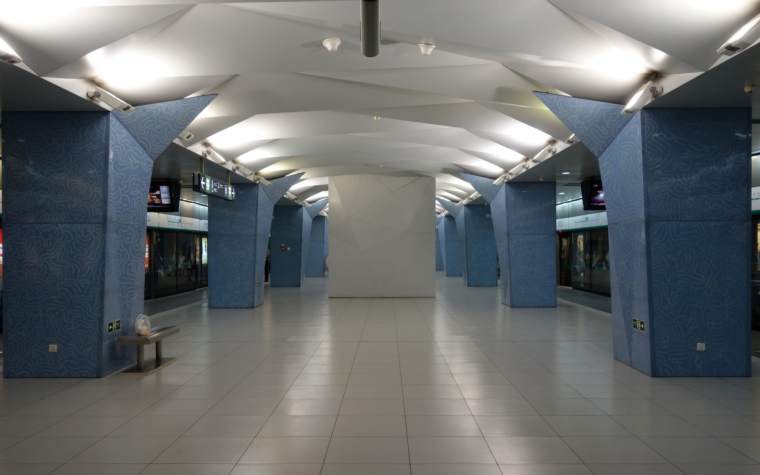 北京地铁8号线奥体中心车站站台